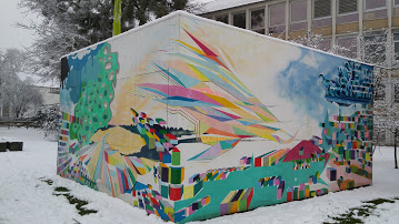 Der Kubus vor dem Haupteingang des Ratsgymnasiums